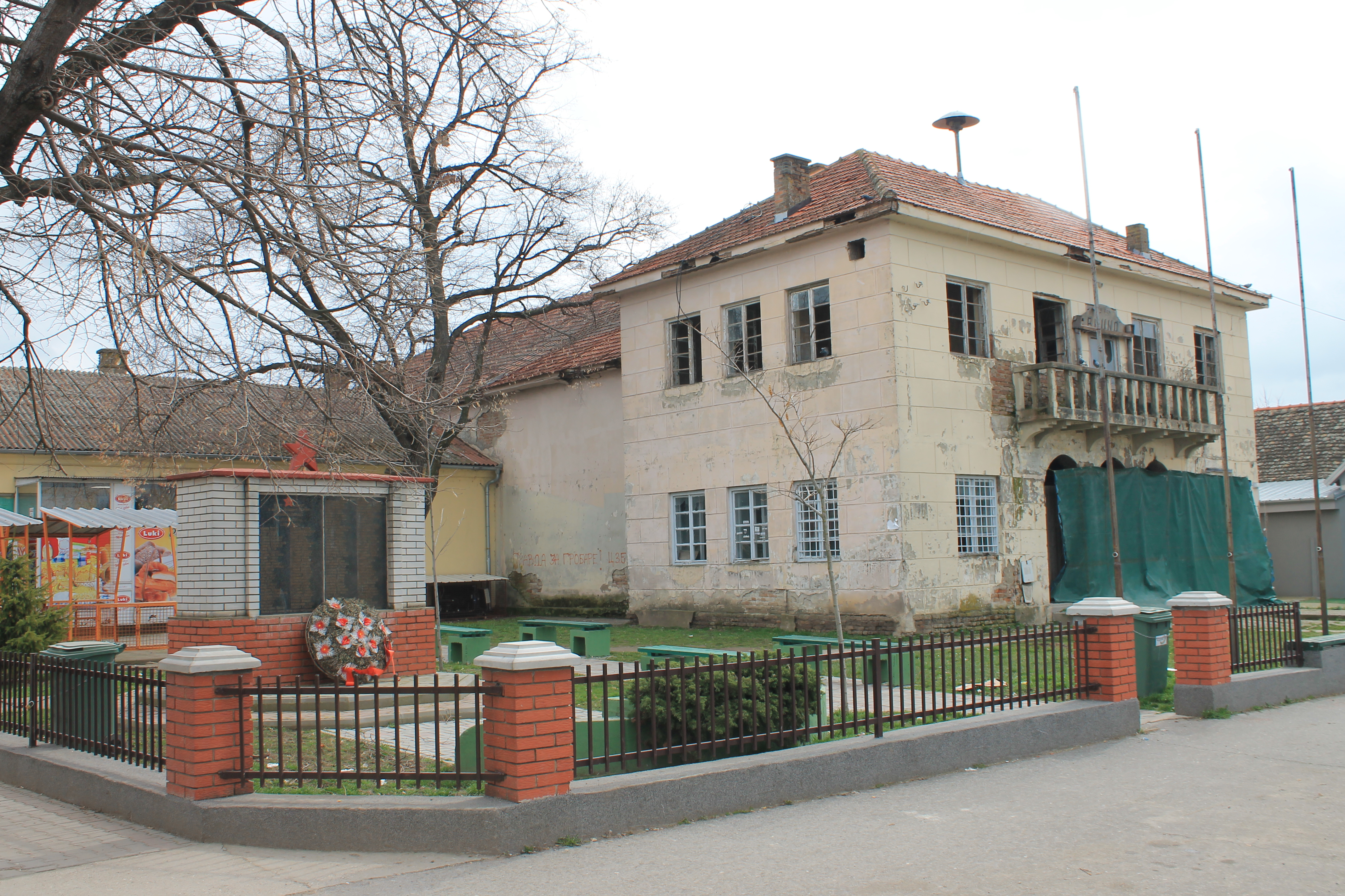 Veliki Radinci-Dom Kulture